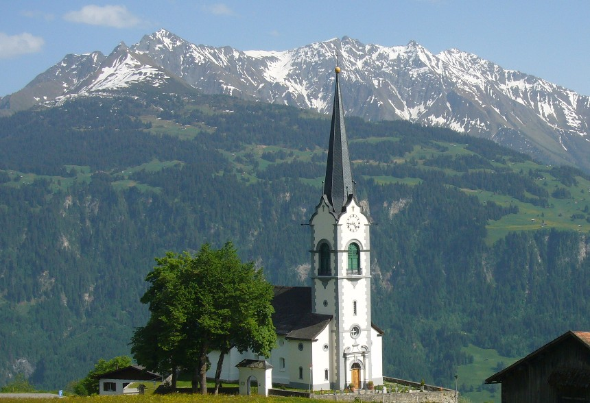 Signinagruppe hinter Kirche Ladir; links Piz Riein, über Kirchturmspitze Piz Fess und rechts Piz Signina und Günerhorn